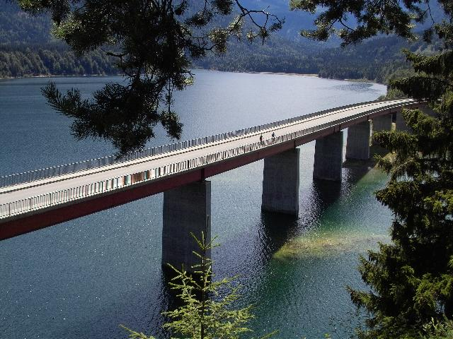 „Europabrücke“ über den Sylvensteinspeicher in Richtung Fall